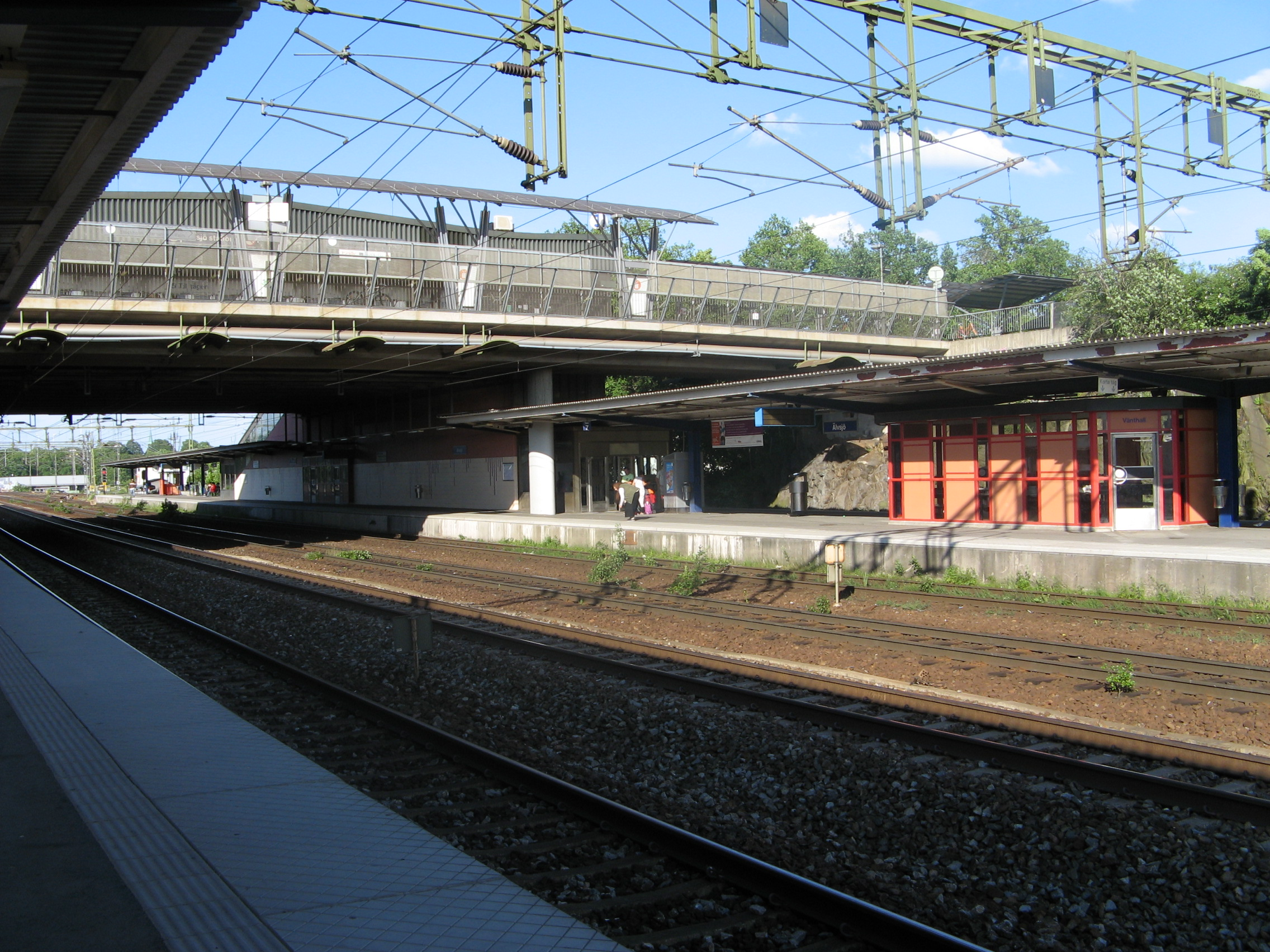 Älvsjö station, Stockholm, Sweden